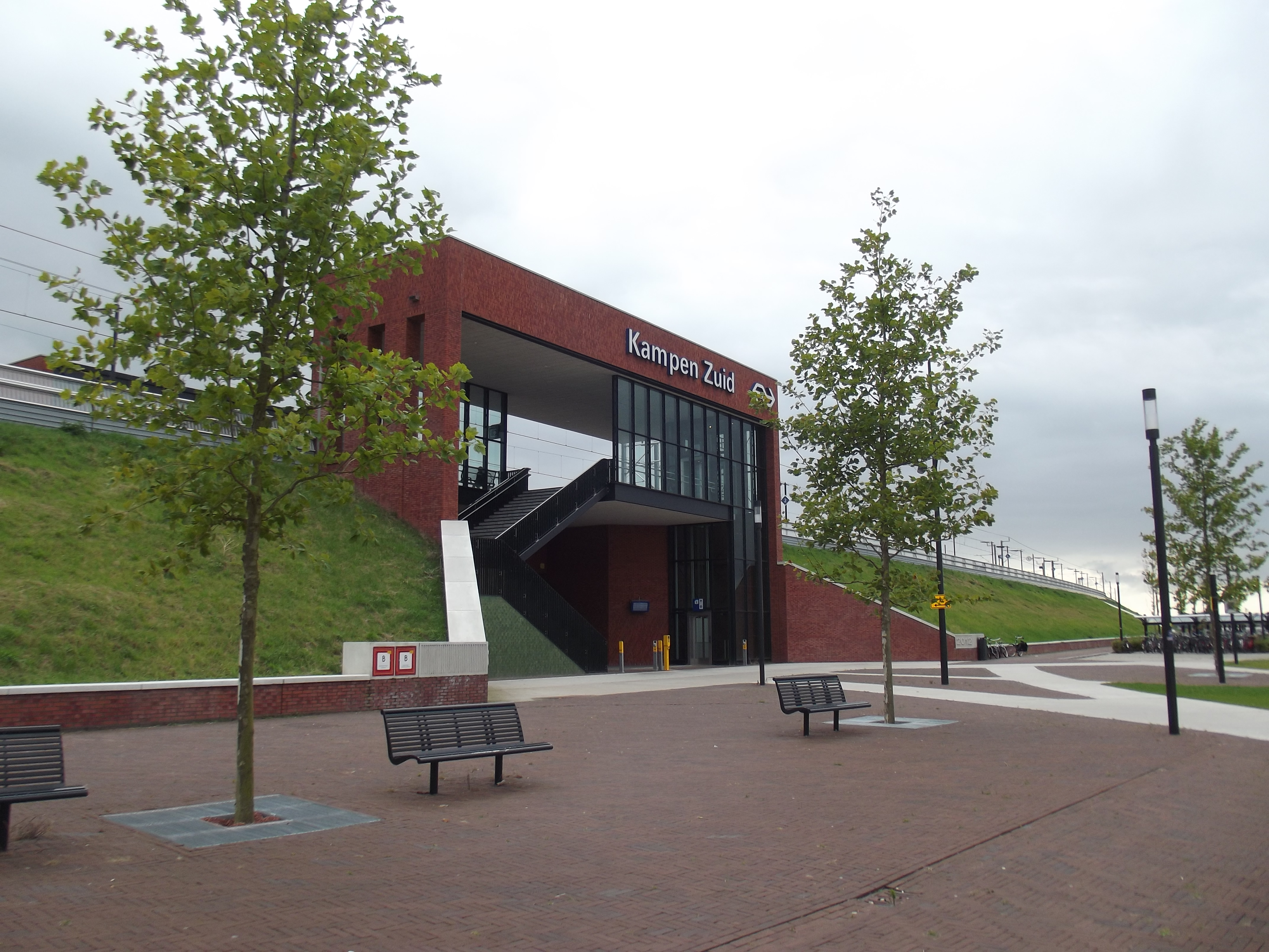 De ingang gezien vanaf het busstation